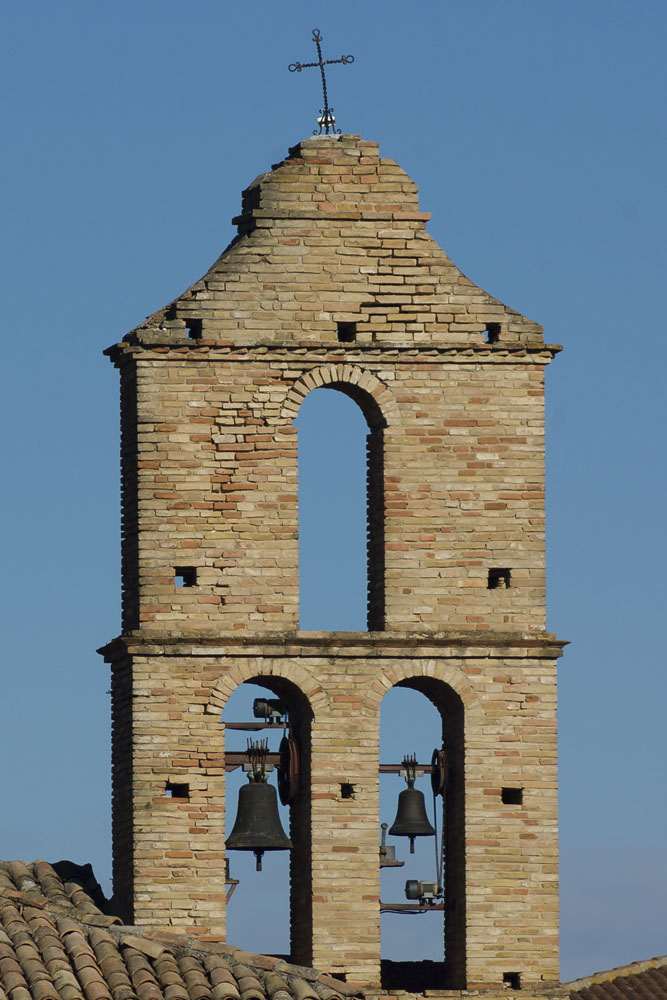 Dettaglio della torre campanaria dell'ex convento di Santa Giovina (ora Città della Musica)